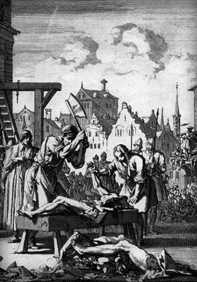 Мученичество Артура Белла. Момент четвертования